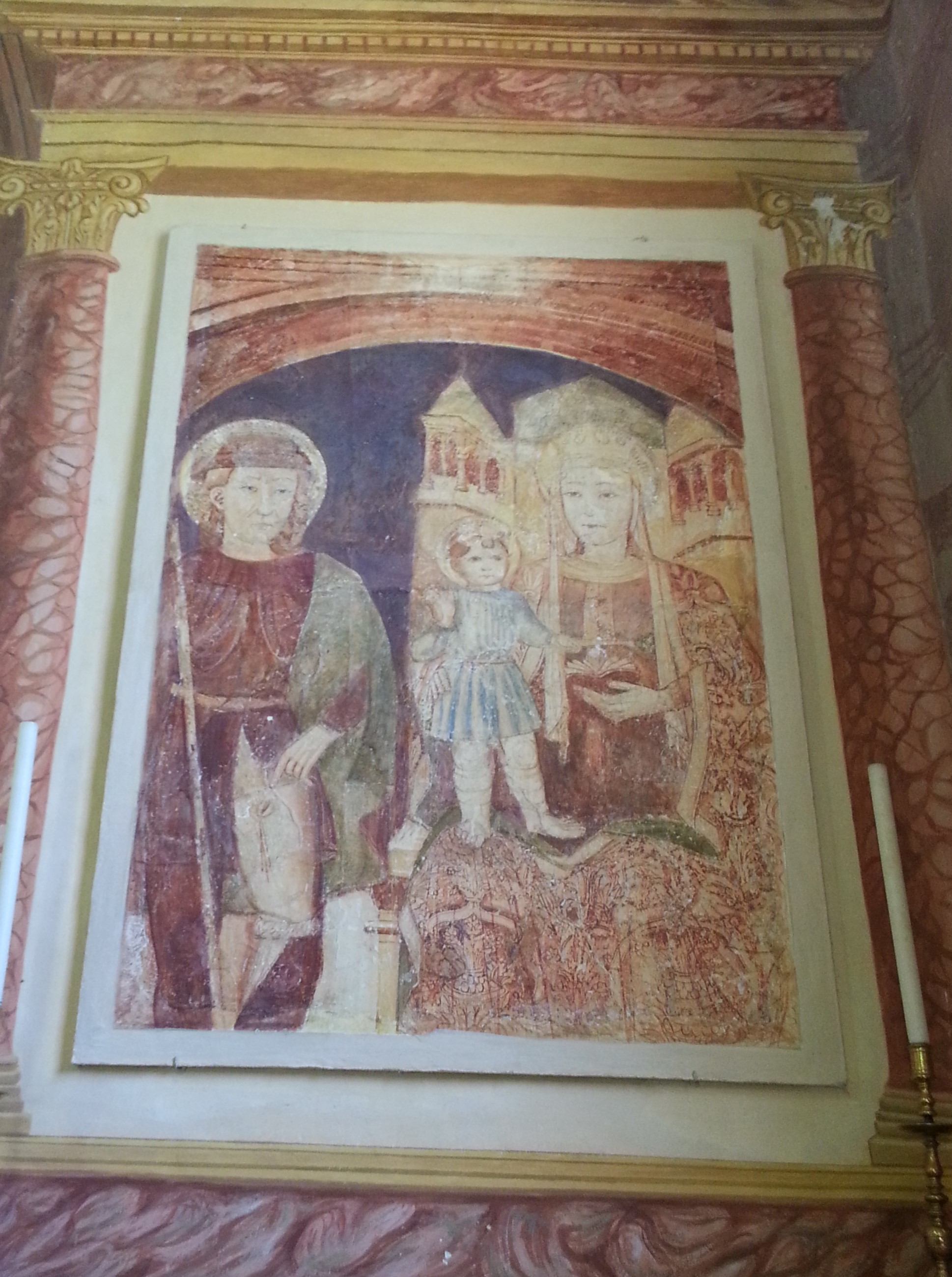 Pala d'altare con san Rocco e Madonna in trono